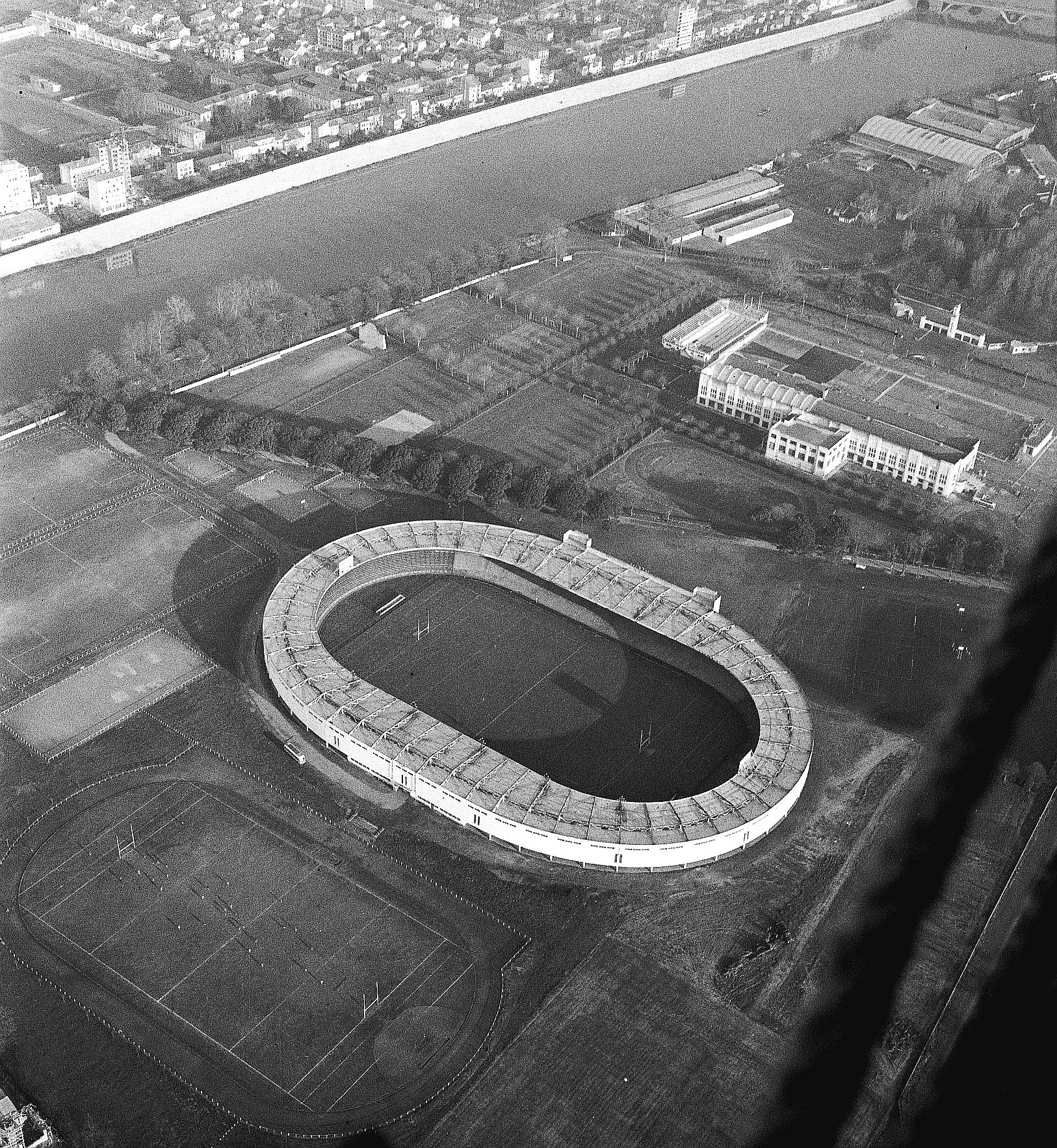 Stadium municipal de Toulouse et parc des sports sur l'île du Ramier. Le 15 Février 1961. Vue aérienne du Stadium et des alentours.